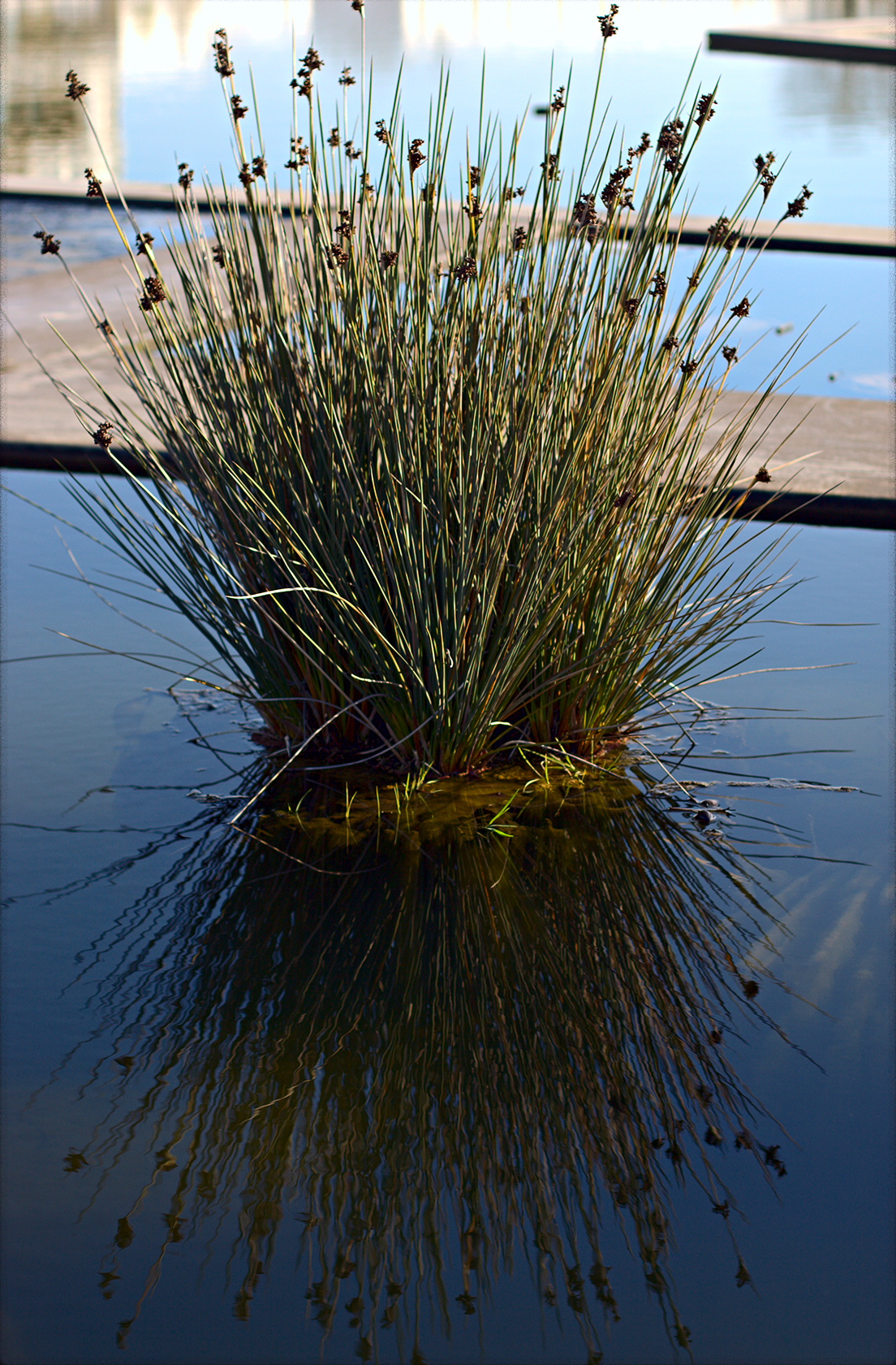 Jardin Botanique in Bordeaux, France.